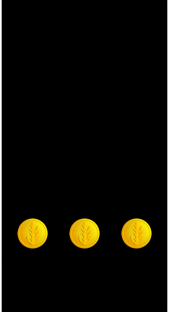 IDF Navy CPO obsolete